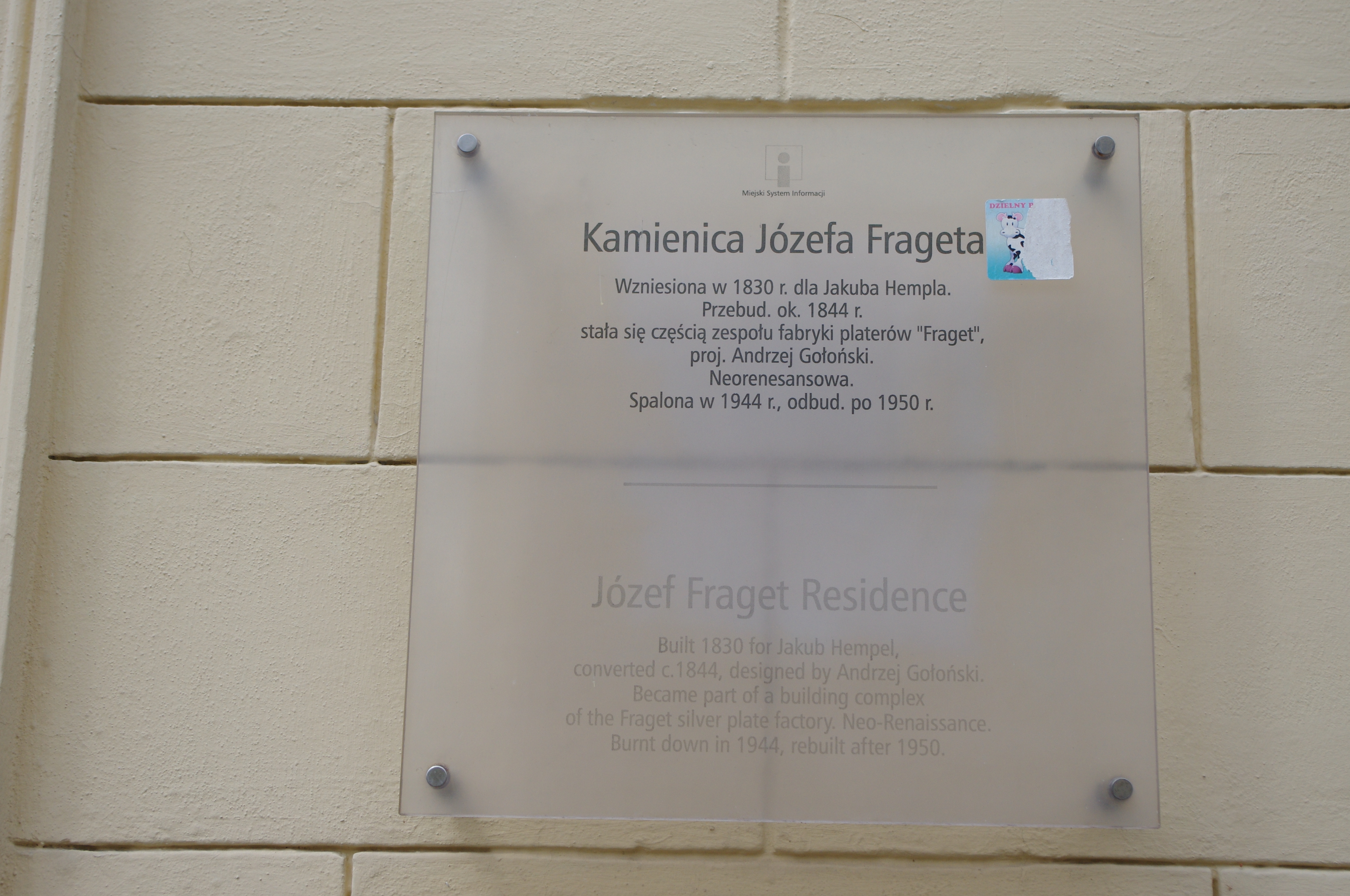 Tablica na Kamienicy Józefa Frageta przy ul. Elektoralnej 16/22 w Warszawie